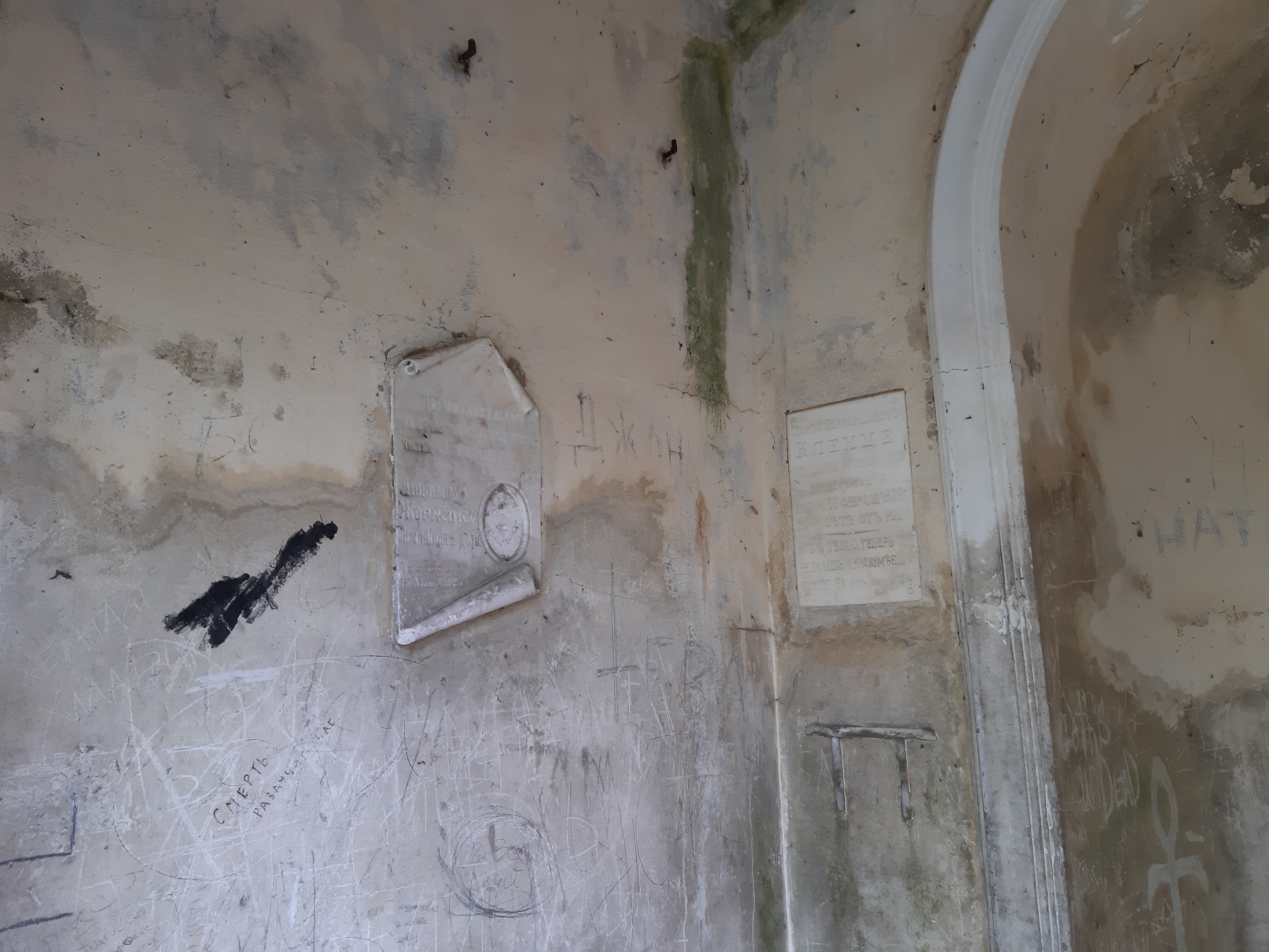 Магілёў. Успенскія могілкі